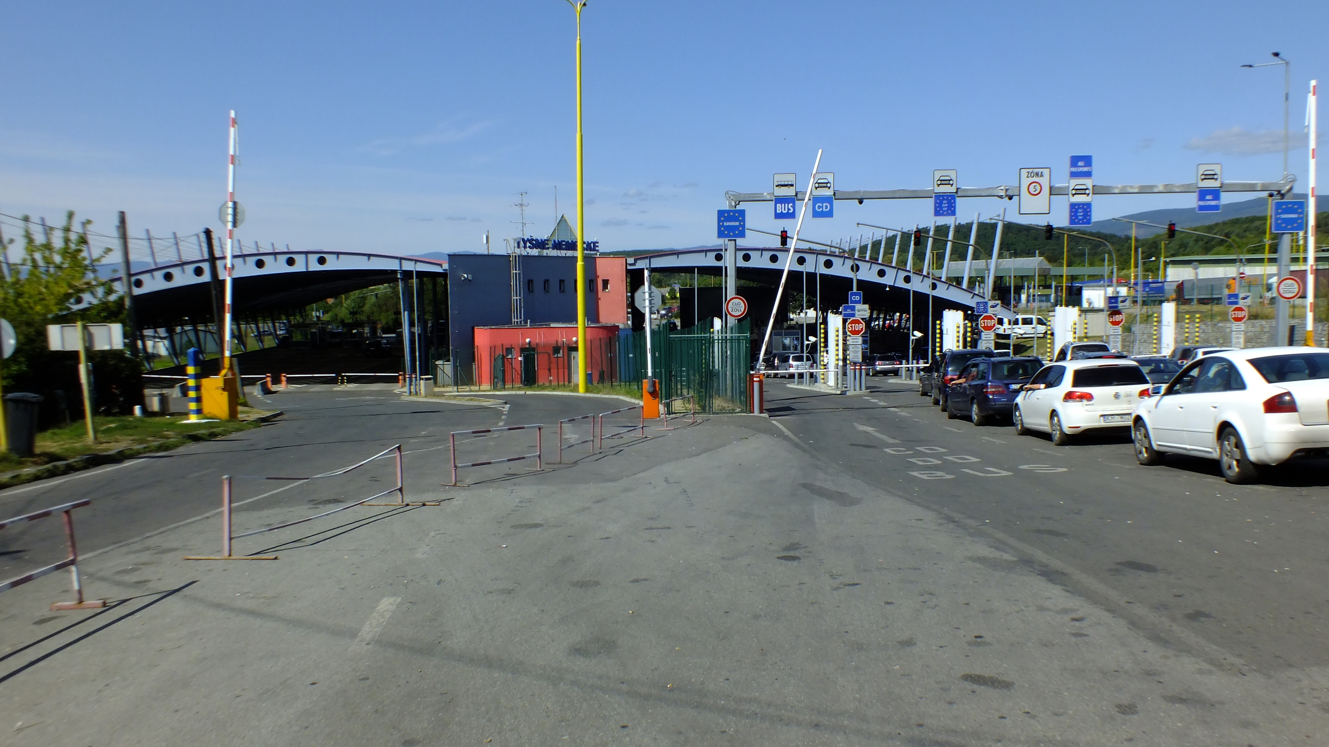 Hraniční přechod Vyšné Nemecké - Užhorod - Slovenská strana